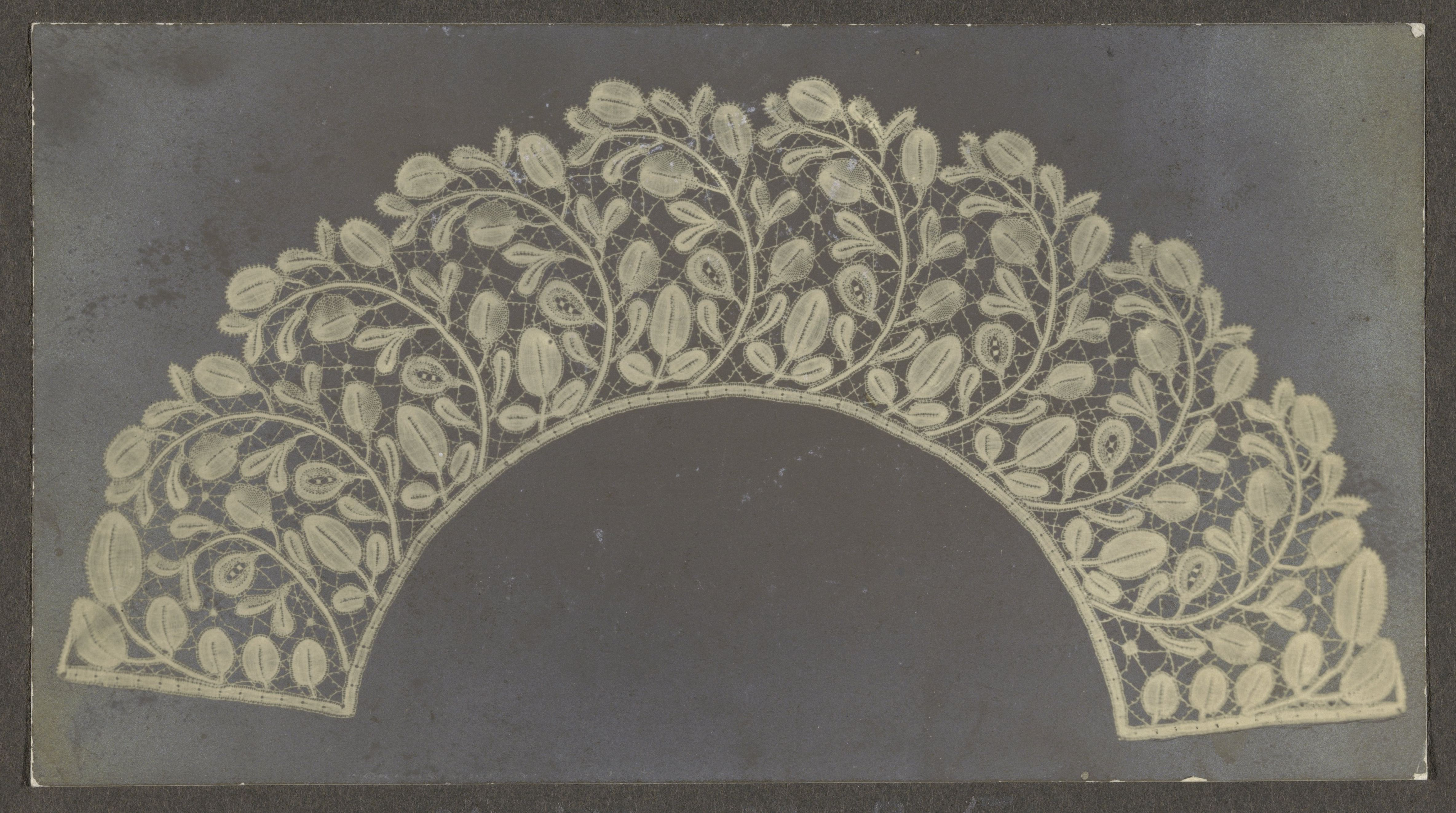 IdentificatieTitel(s): Foto van een waaierblad van kant met een rij in één richting gebogen takkenObjecttype: foto Objectnummer: BK-1979-33-B-5Omschrijving: Foto van een waaierblad van kant met een rij in één richting gebogen takken. De foto hoort bij vijf andere foto's van kant met inventarisnummers: BK-1979-33-B-1 t/m BK-1979-33-B-6. De hier beschreven foto is samen met foto BK-1979-33-B-6 op een zwart karton geplakt, op de achterkant zijn BK-1979-33-B-3 en BK-1979-33-B-4 geplakt. Het betreft kanten objecten die zijn gemaakt door L.W. van der Meulen-Nulle en J.H. Pleging-Faber. Zij werkten onder andere als kantdocent aan de Rijksacademie voor Kunstnijverheid.VervaardigingVervaardiger: fotograaf: anoniemPlaats vervaardiging: NederlandDatering: ca. 1900 - ca. 1924Fysieke kenmerken: fotopapier op karton geplaktMateriaal: fotopapier karton Techniek: fotografieAfmetingen: karton: h 27 cm. × b 21,5 cm. foto: h 8,3 cm. × b 15,3 cm. Verwerving en rechtenCredit line: Schenking van de Vereniging Het KantsaletVerwerving: schenking 1979Copyright: Publiek domein